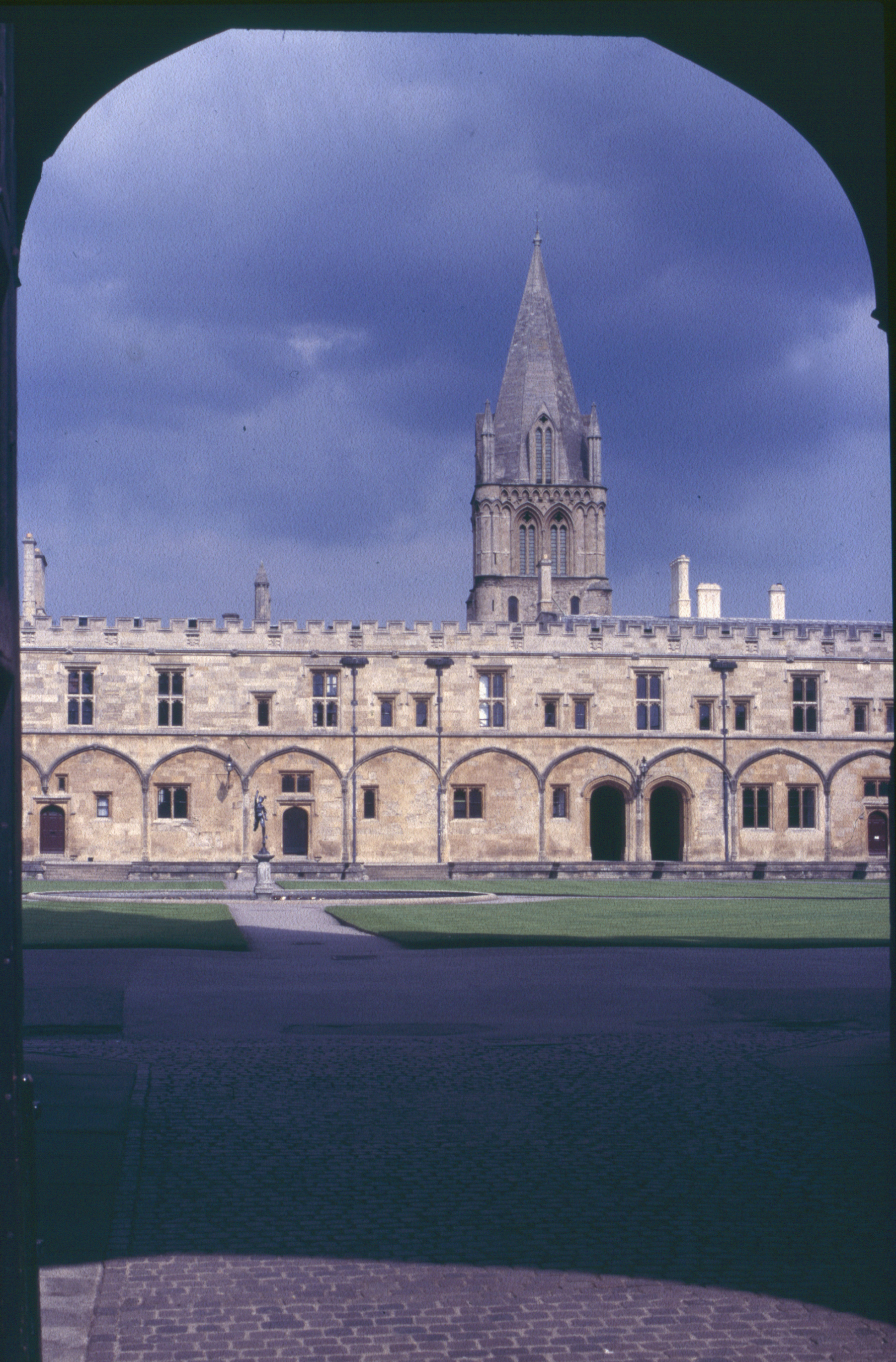 1985 in Oxford